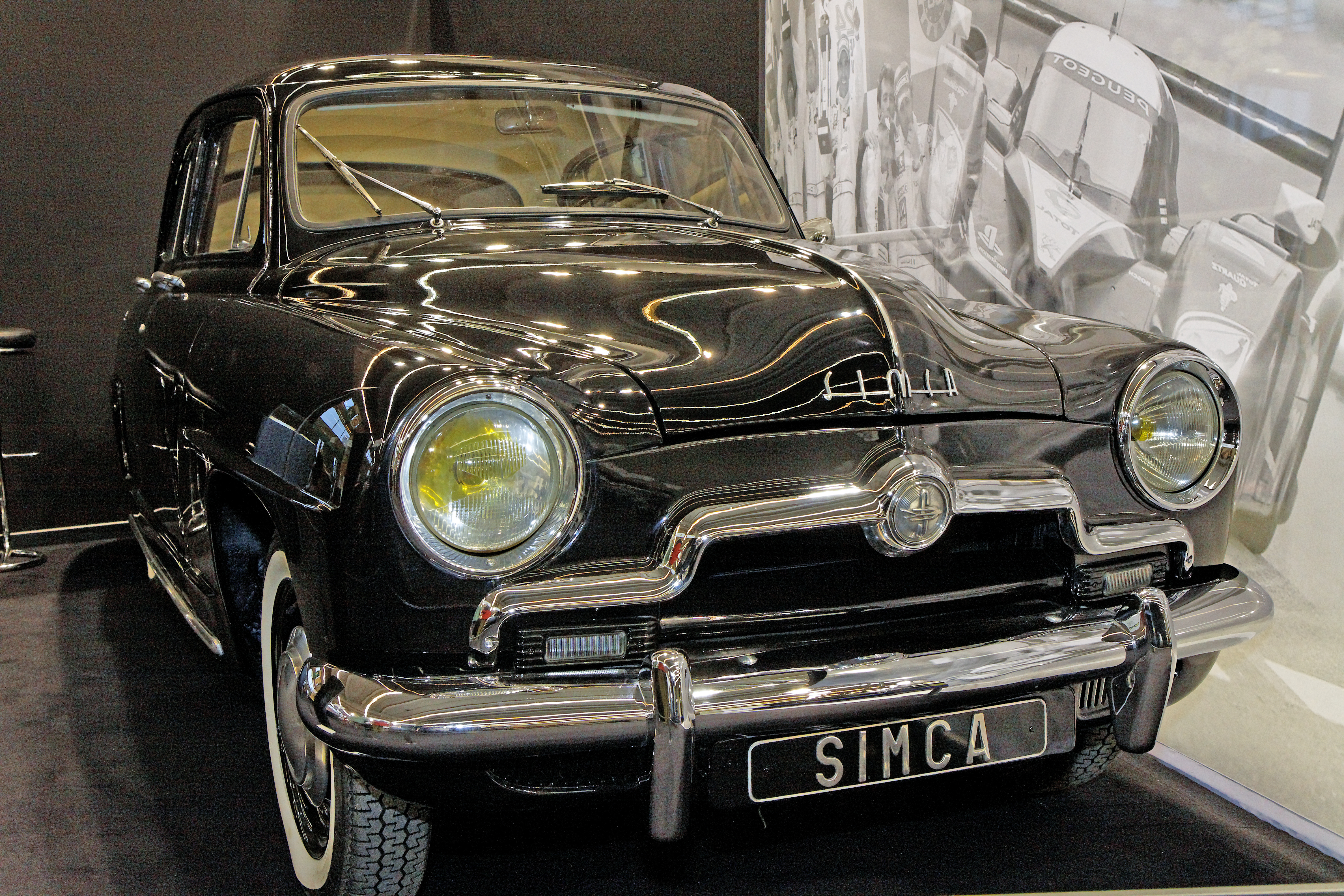 Photographie prise lors du salon rétromobile 2011 à Paris, porte de Versailles.